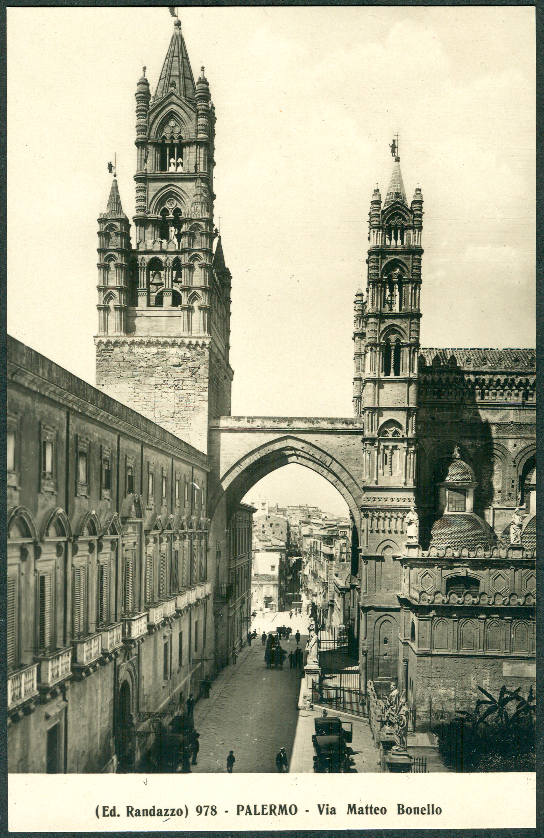 Ansichtskarte mit der fortlaufenden Nummer 978 aus der Edition Randazzo der Firma Gevaert, hier mit der Bilduntertitelung „Ed. Randazzo) 978 - Palermo - Via Matteo Bonello“ In dem im Vordergrund links zu sehenden Gebäude hält heute das italienische Museum Museo Diocesano di Palermo seine Schätze für Besucher vor ...